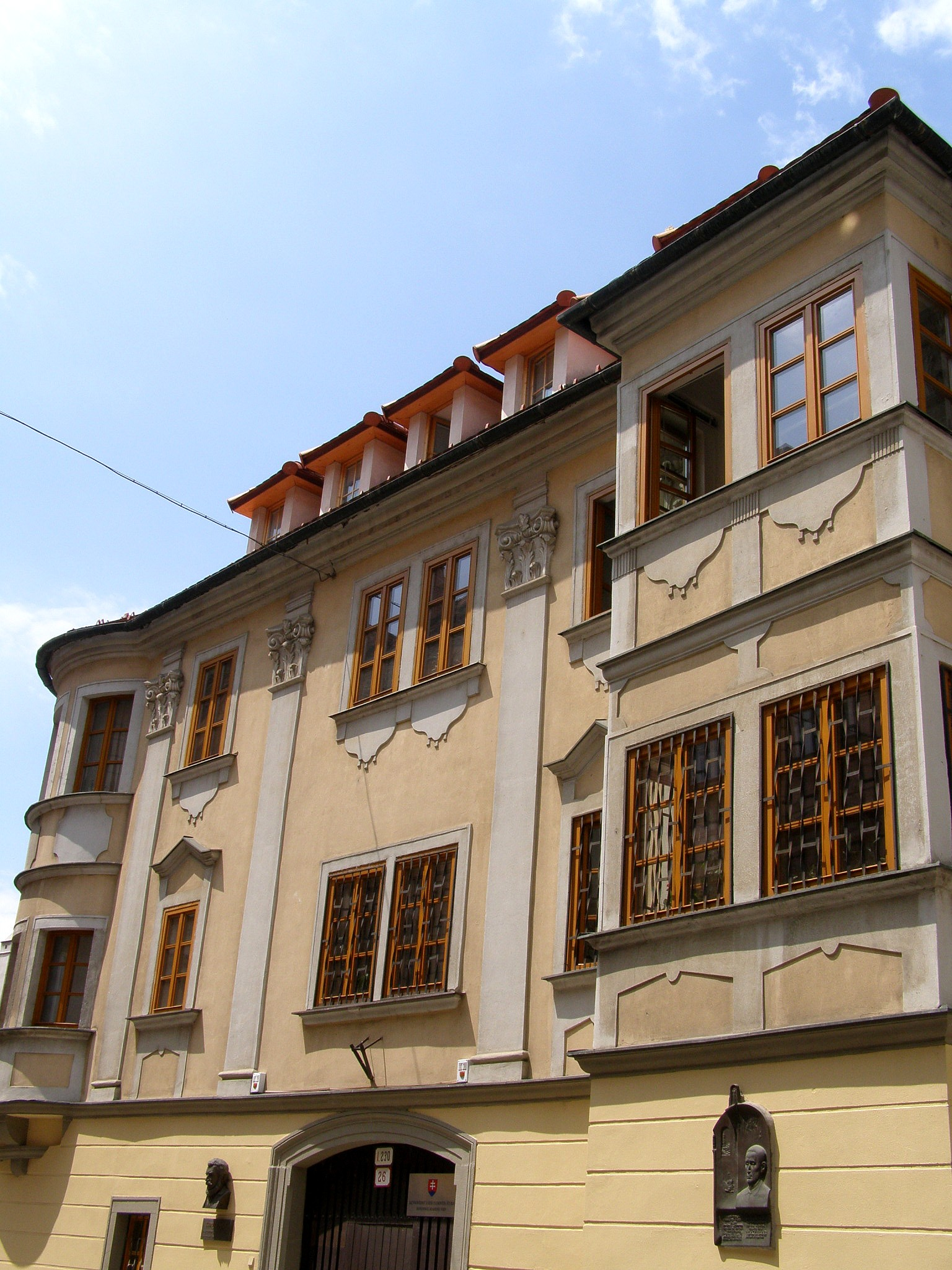 Panská ul. č. 26. Meštiansky dom zo 14. stor. V nasledujúcom storočí ho rozšírili a v 17. storočí na jeho nárožie pridali valcový arkier. V 18. storočí dom bohato upravili a v nádvorí zriadili pavlače s umelecky kovanými mrežami. V budove dnes sídli Jazykovedný ústav Ľudovíta Štúra SAV Object location48° 08′ 30.48″ N, 17° 06′ 21.24″ E